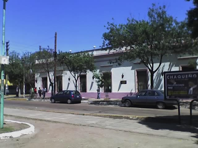 Munucipal Museum, Merlo Partido, Buenos Aires Province, Argentina.